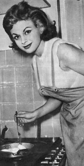 photo from Italian magazine Avanguardia, 1956.